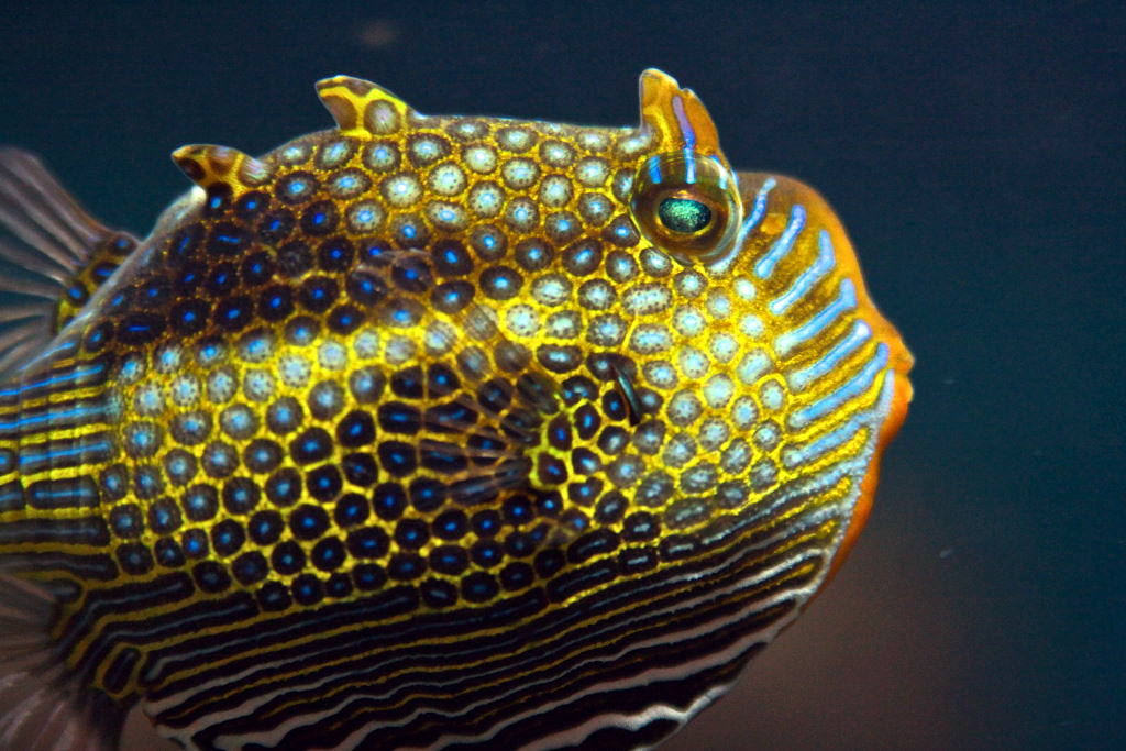 Aracana ornataAlien?